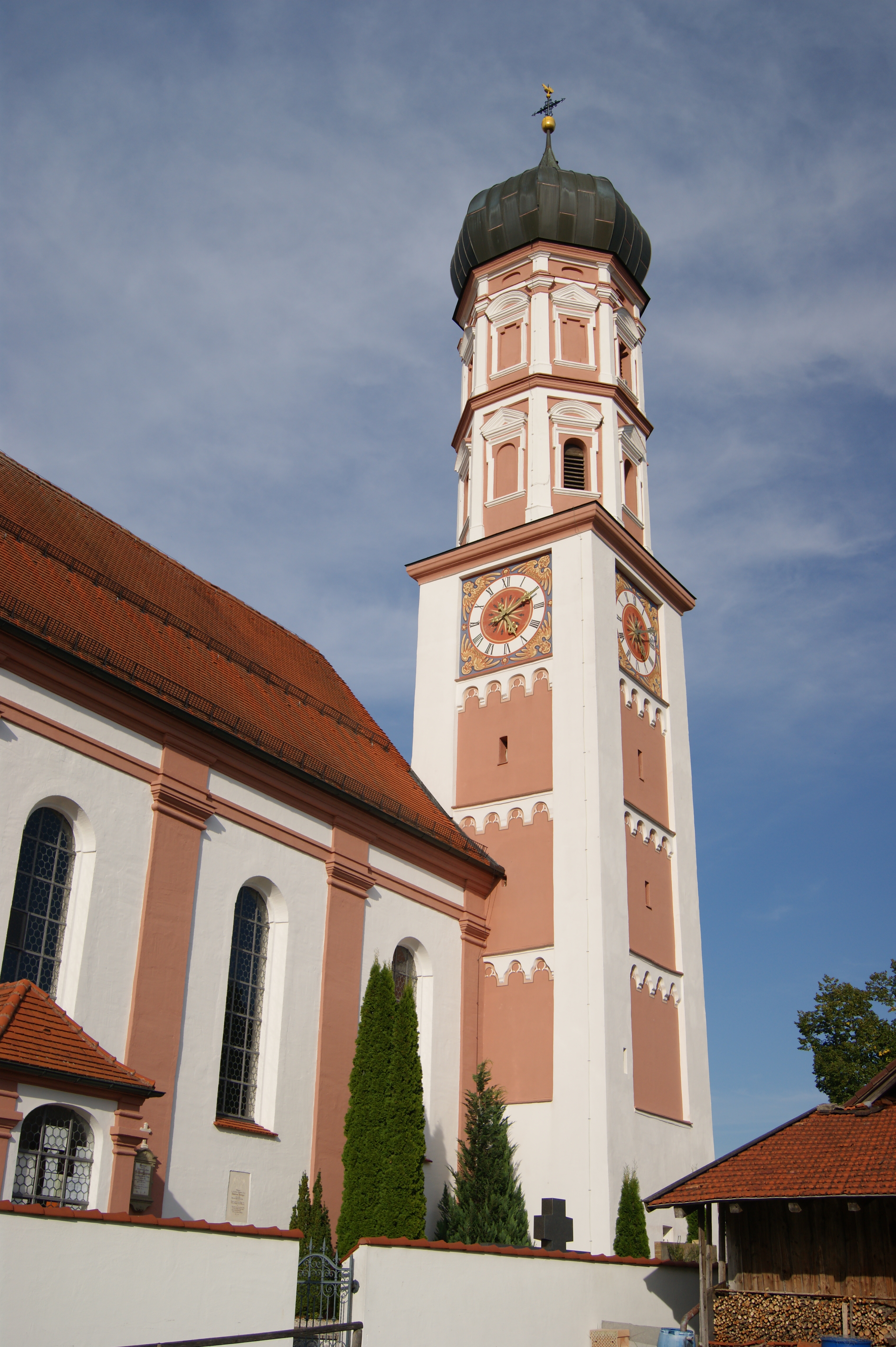 La preĝejo St. Michael en Stockheim (Bad Wörishofen)